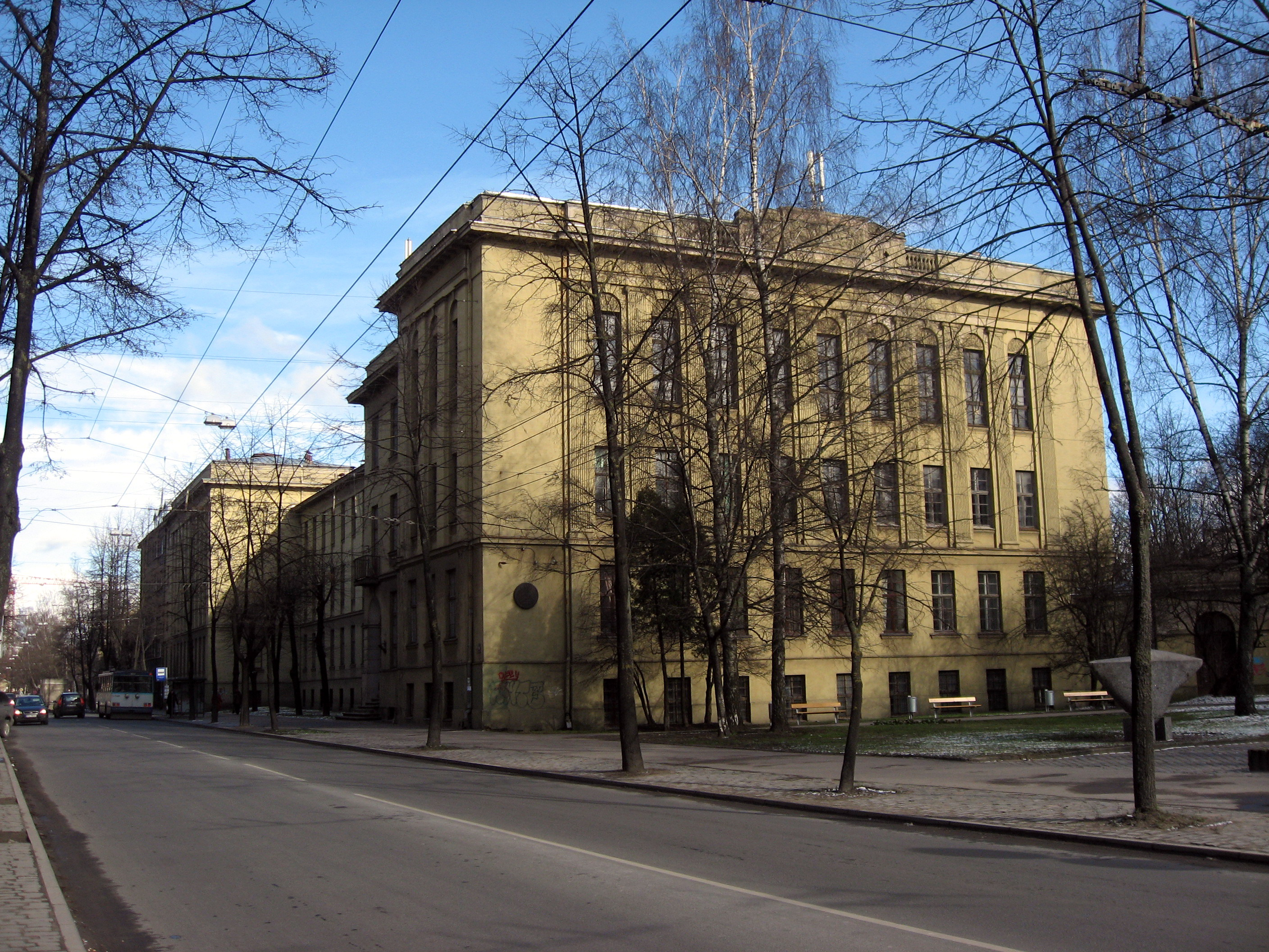 Chemická fakulta Lotyšské univerzity